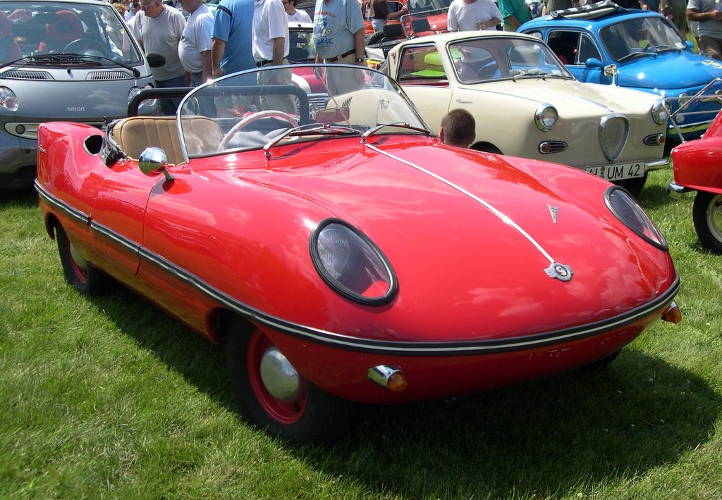 Dart